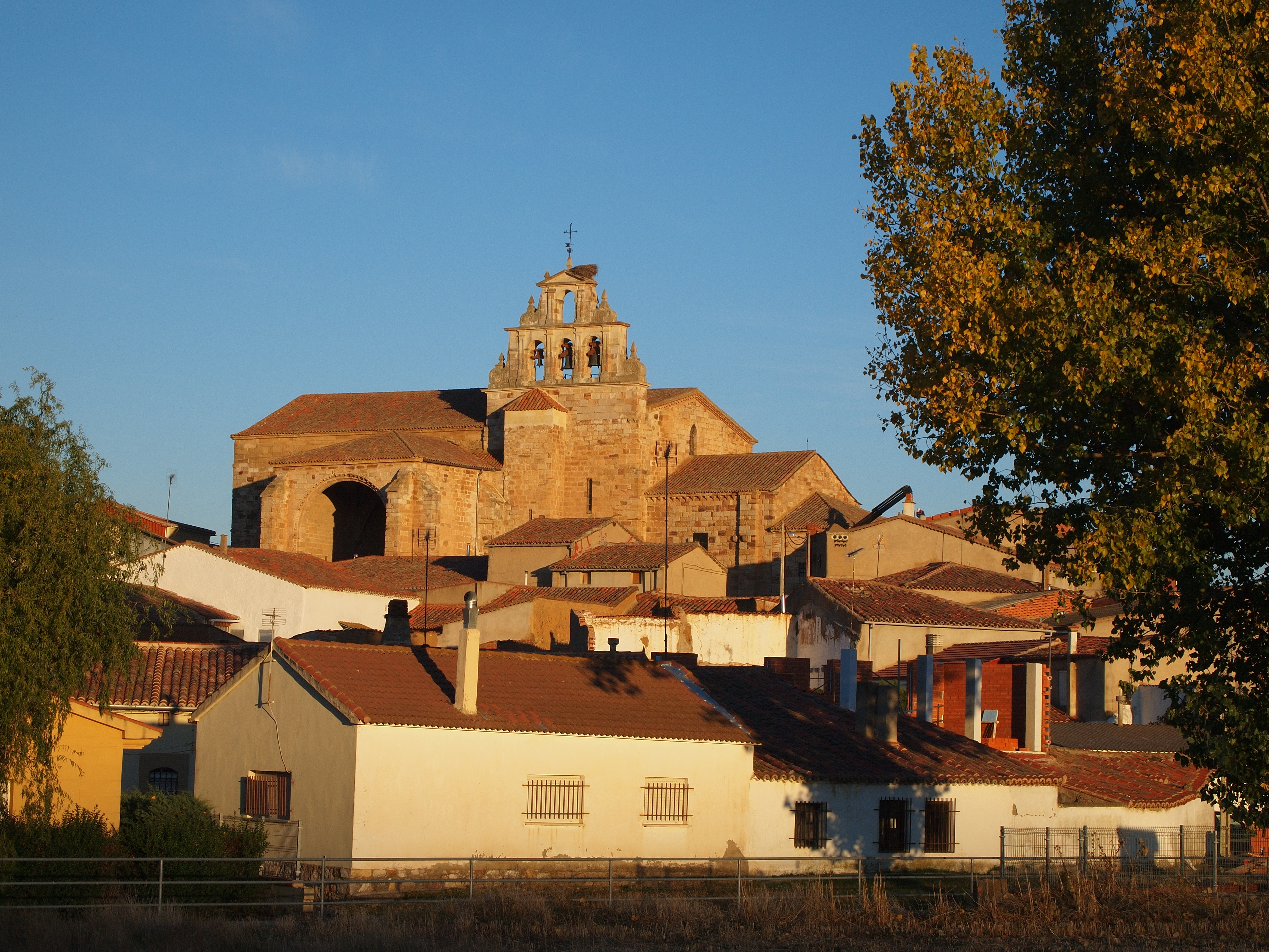 Vista de la iglesia de la localidad de La Hiniesta, cerca de la ciudad de Zamora (España)